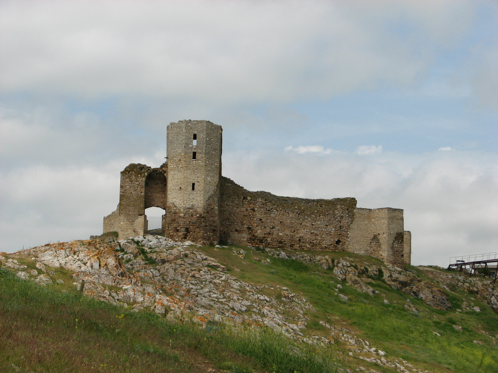 Situl arheologic de la Enisala, punct Palanca, Tulcea, Dobrogea